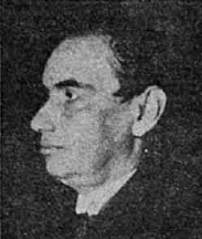 Januario Espinosa del Campo en 1938. Fotografía en Revista Ecran de 1938